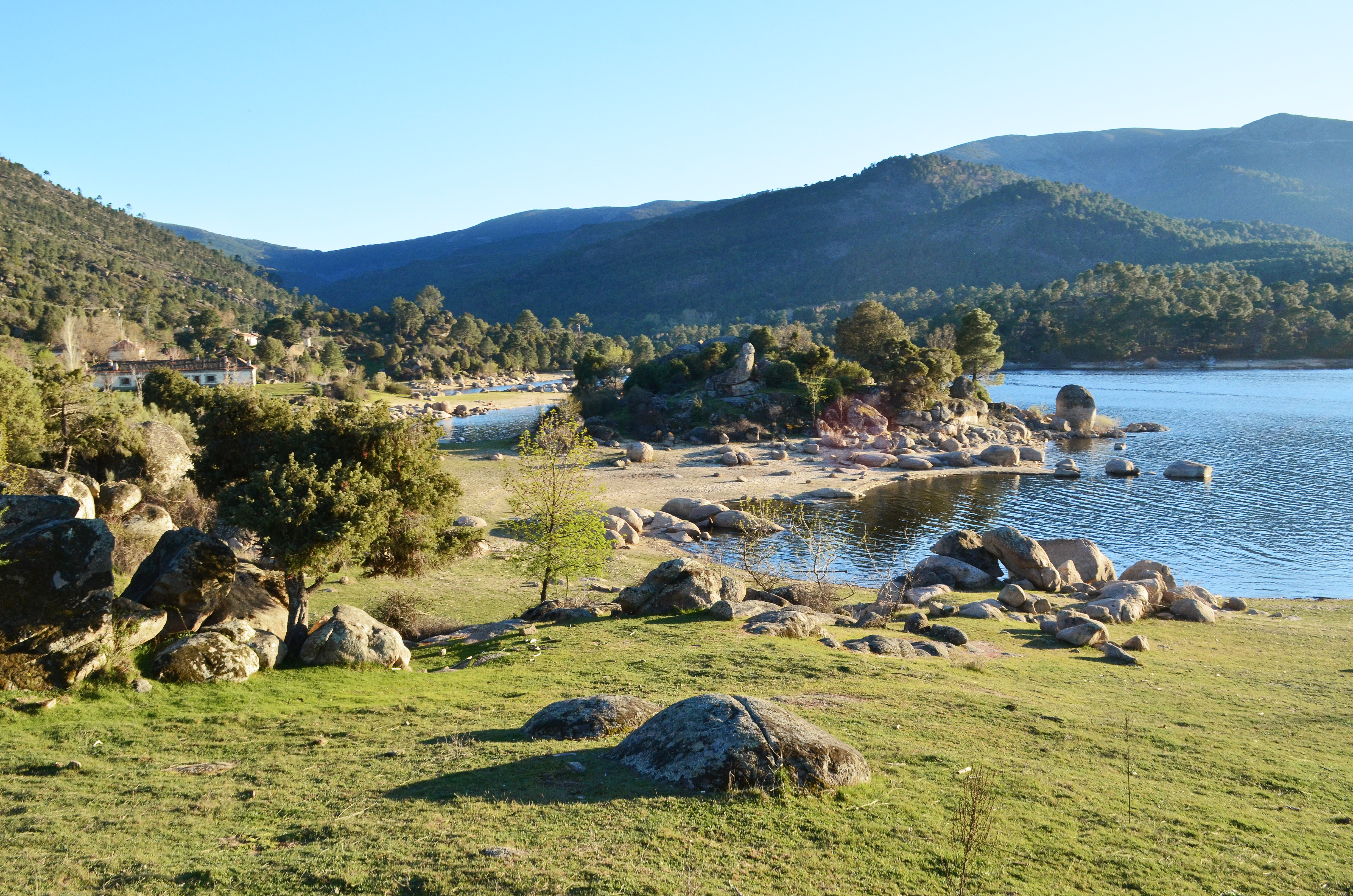 Embalse El Burguillo en el Valle de Iruelas This is a photography of a Special Area of Conservation in Spain with the ID: ES0000116. Natura2000 entry, EEA entry